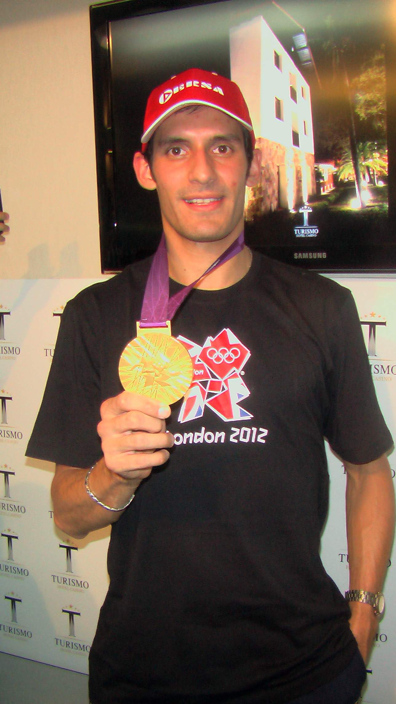 Sebastián Crismanich. Taekwondista argentino. Medallista olímpico en Londres 2012. Medalla de Oro de Taekowndo.